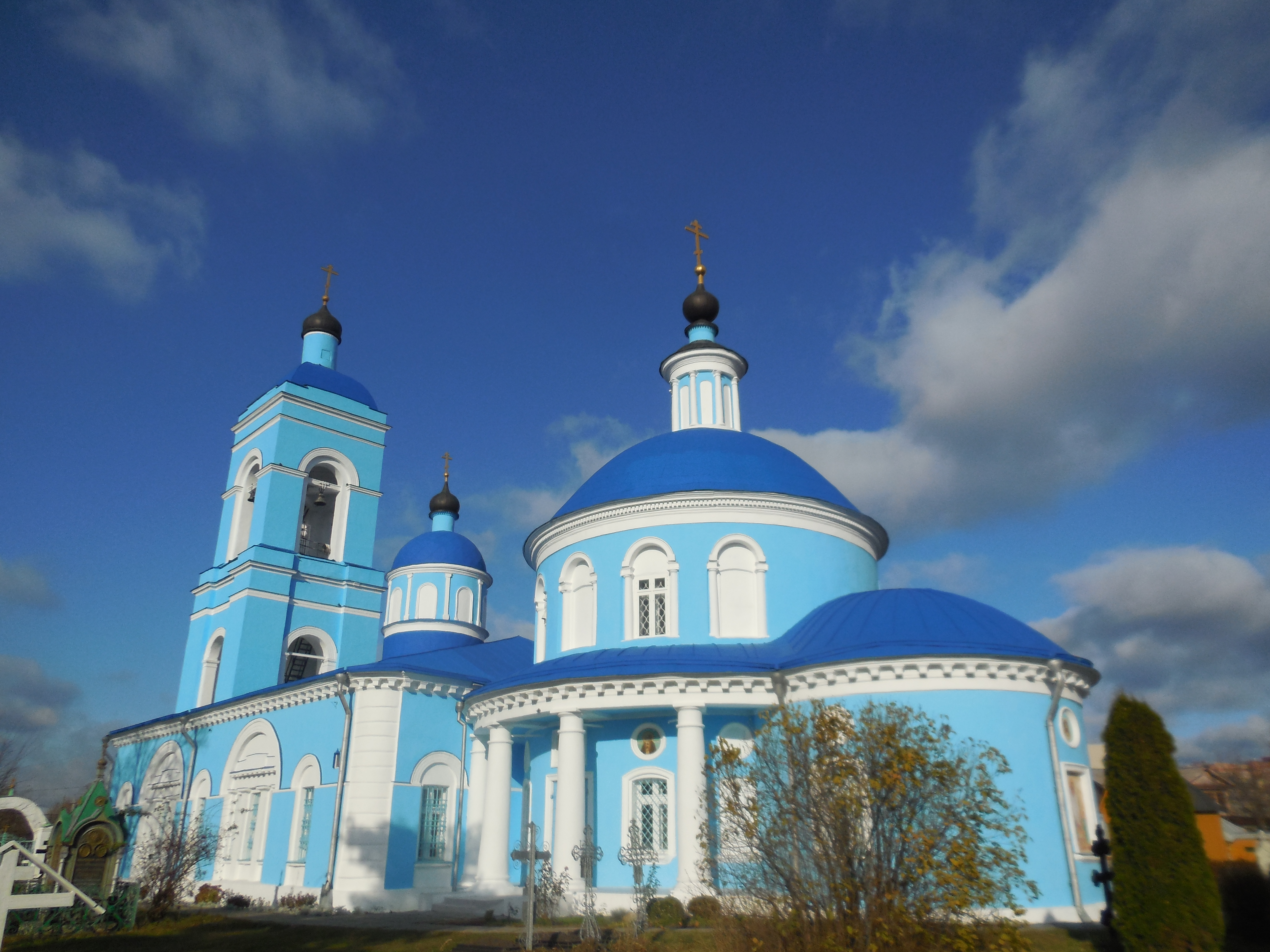 Церковь Покрова Пресвятой Богородицы: улица Широкая, (бывш. село Хомутово), Щёлково, Щёлковский район, Московская область